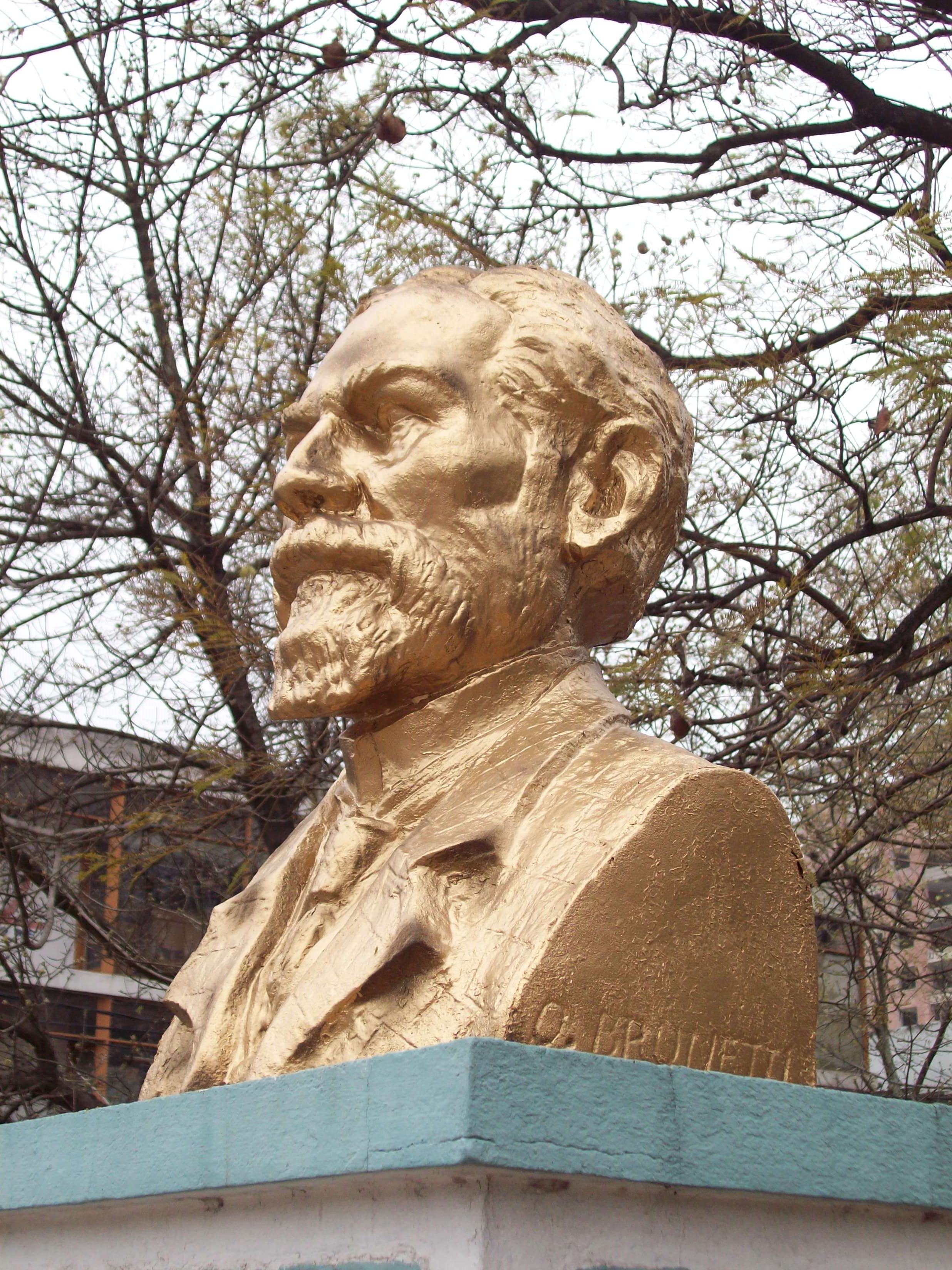 Busto emplazado en Avenida San Martín de Guillermo Hudson, Argentina.